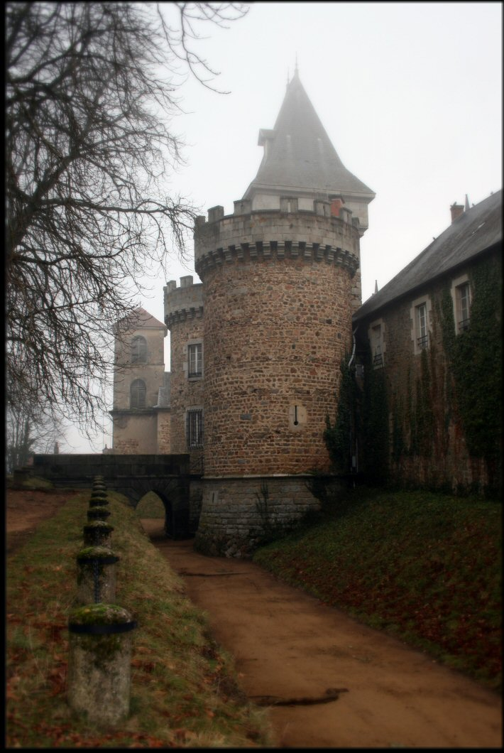 situé à Busset dans le département de l'Allier This building is en partie classé, en partie inscrit au titre des Monuments Historiques. .